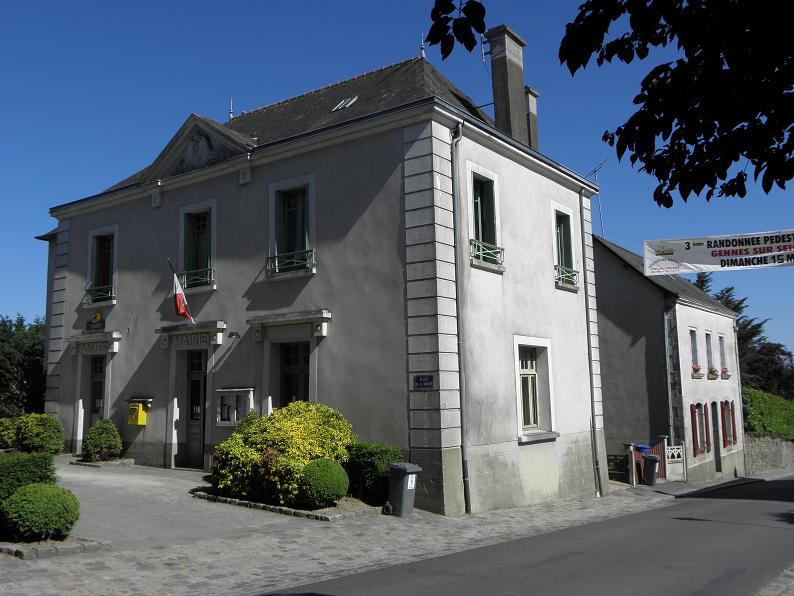 Ancienne Mairie de Gennes-sur-Seiche (35).